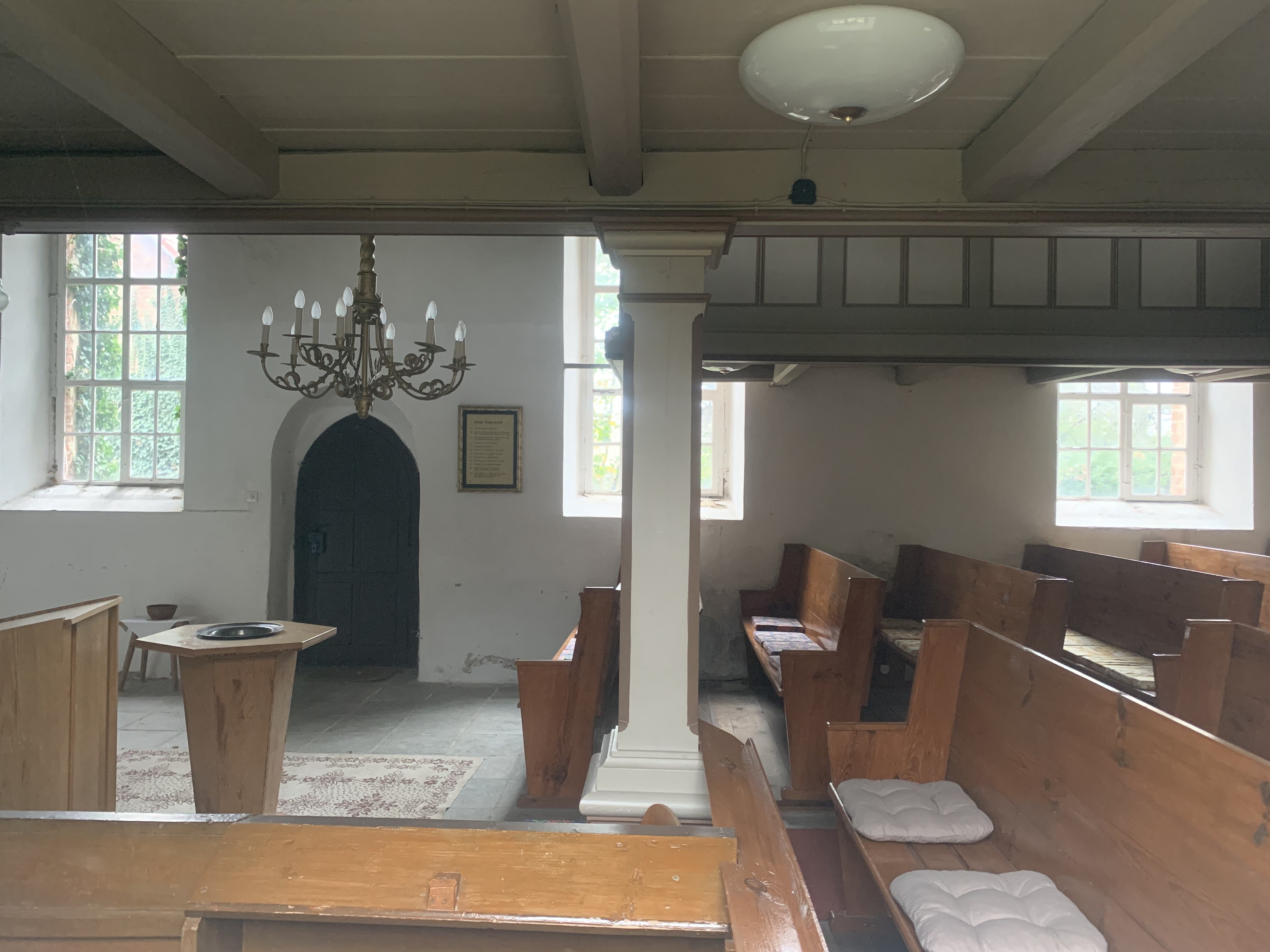 Die Dorfkirche Niederseefeld in der Gemeinde Niederer Fläming im Landkreis Teltow-Fläming ist eine Saalkirche aus dem 15. Jahrhundert. Im Innern steht unter anderem ein Kanzelaltar aus dem Jahr 1883.